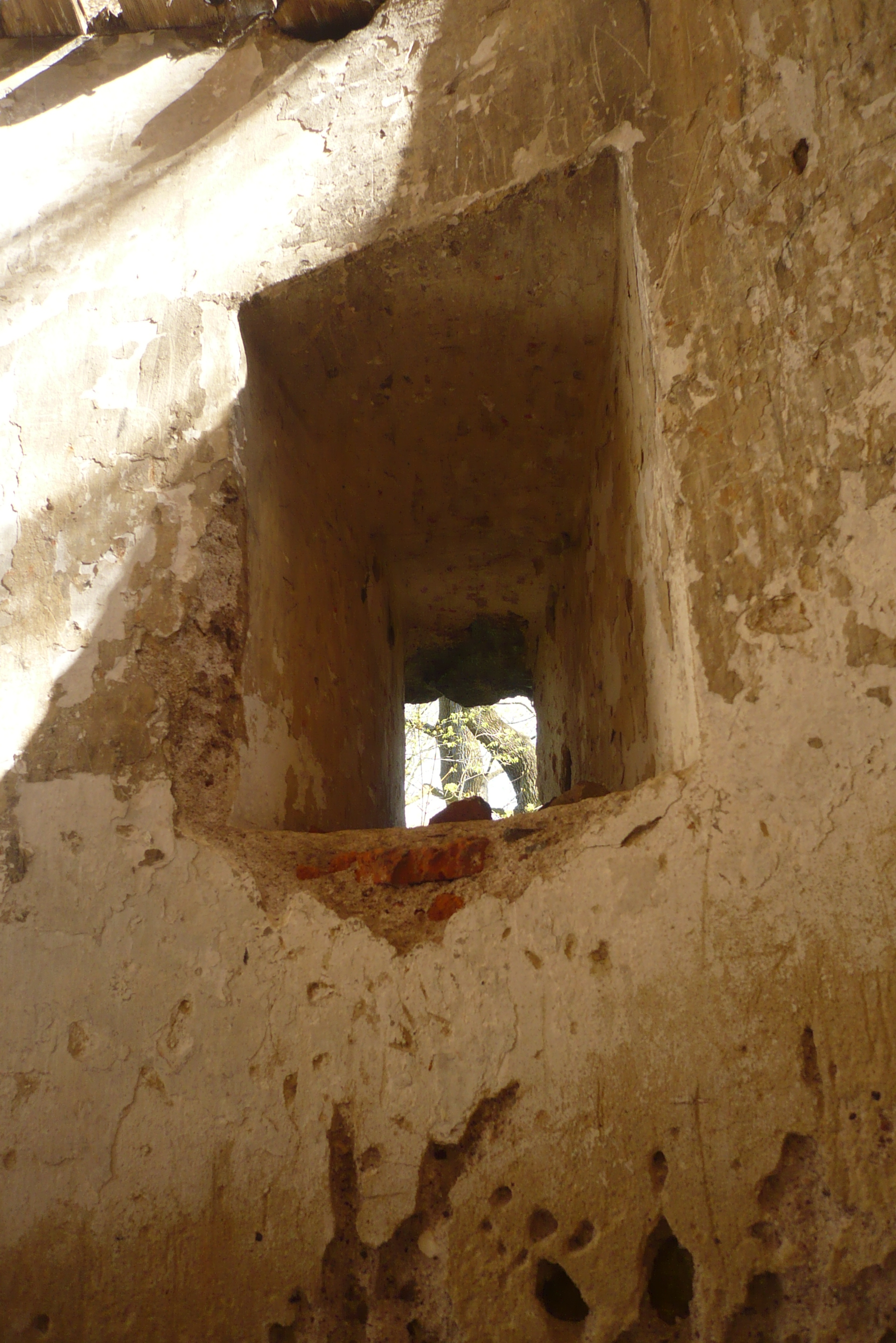 Wieża na Grodziszczu